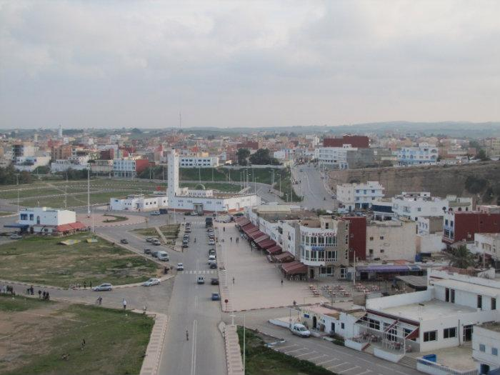 Vista de Ras El Ma (Marruecos), con la mezquita en primer plano